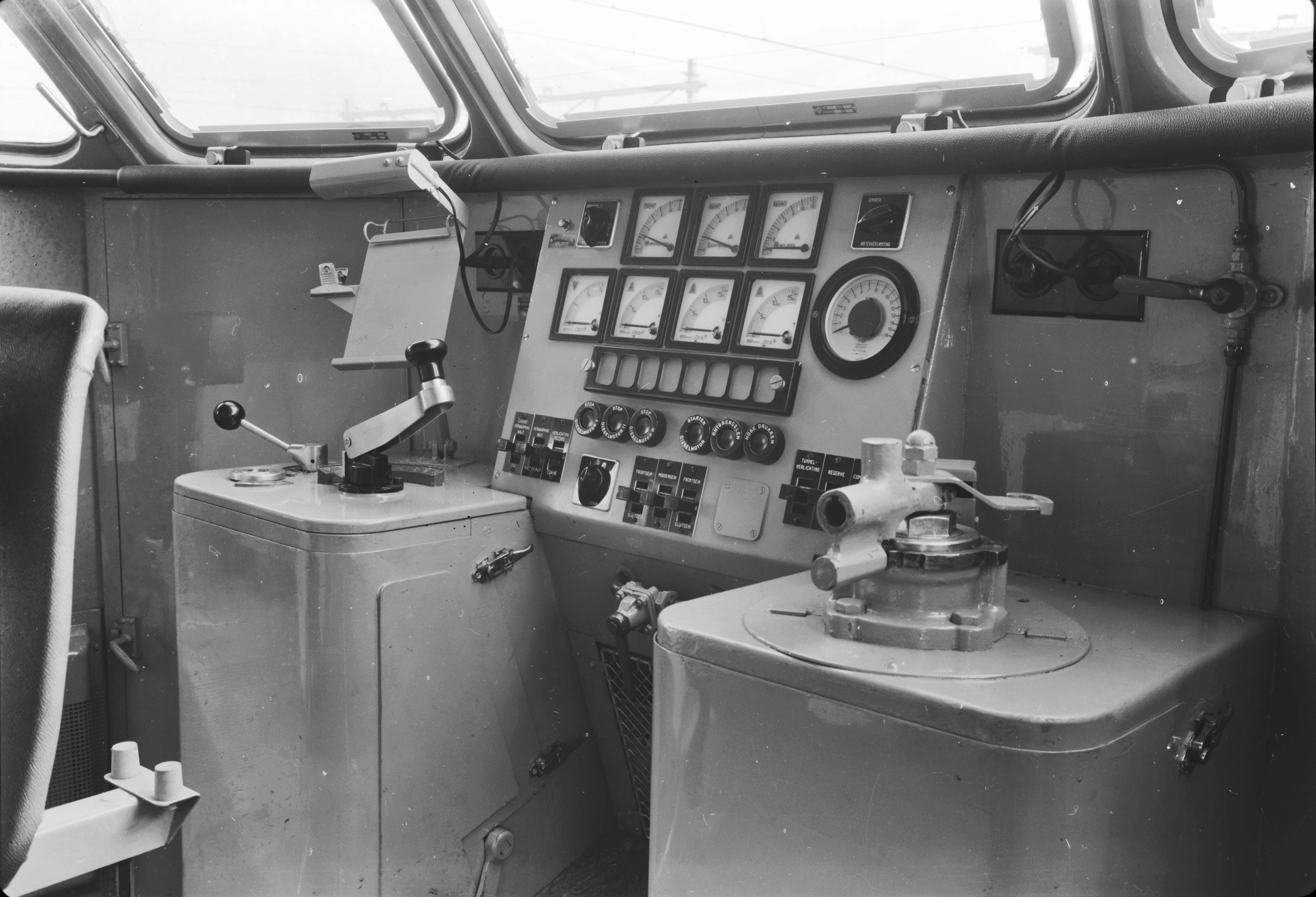 Afbeelding van de stuurstand van een diesel-electrisch treinstel DE 3 (plan U) van de N.S. te Geldermalsen.